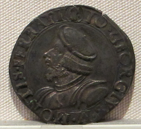 Palazzo Massimo alle Terme